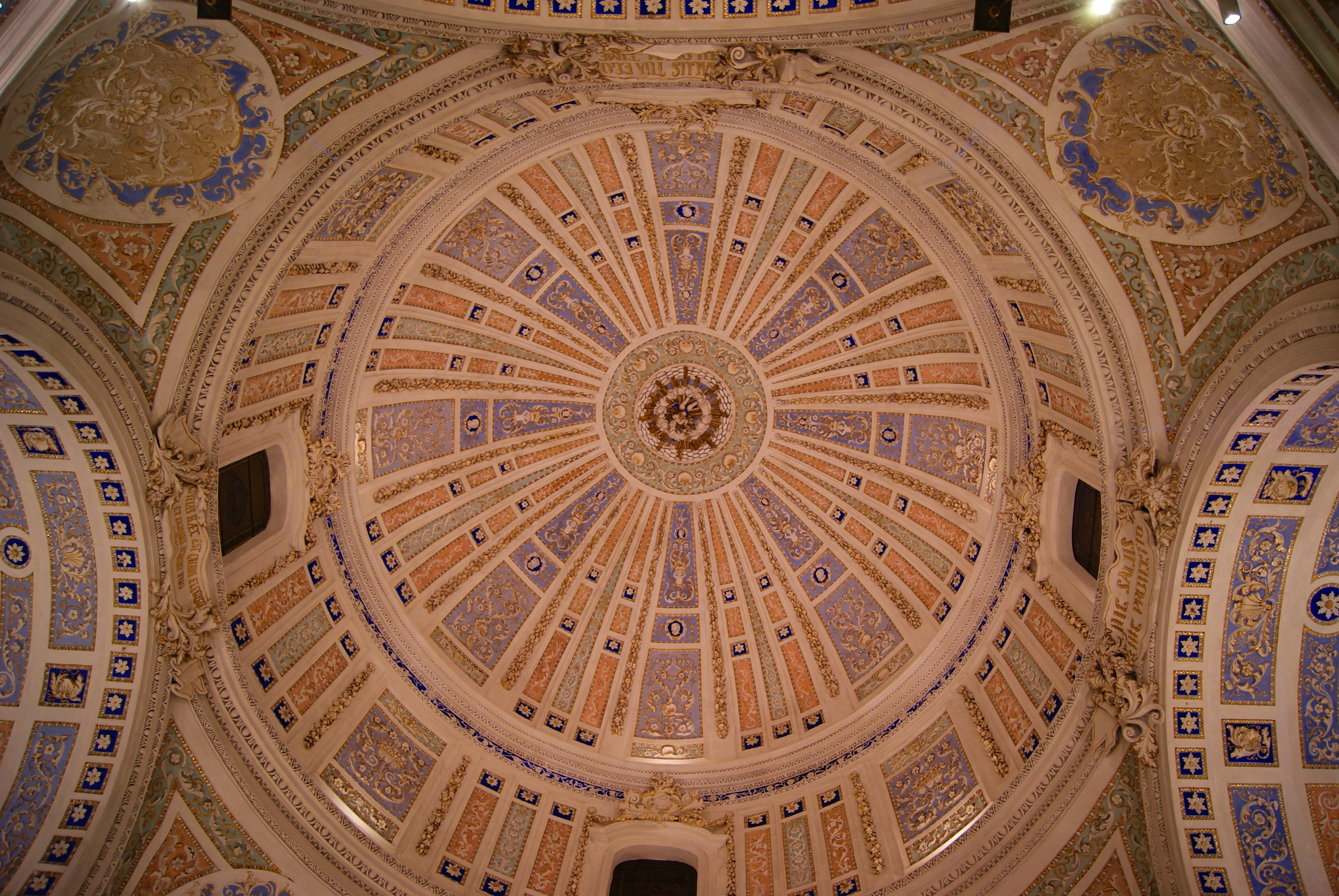 La maestosa cupola della Chiesa di Santa Barbara